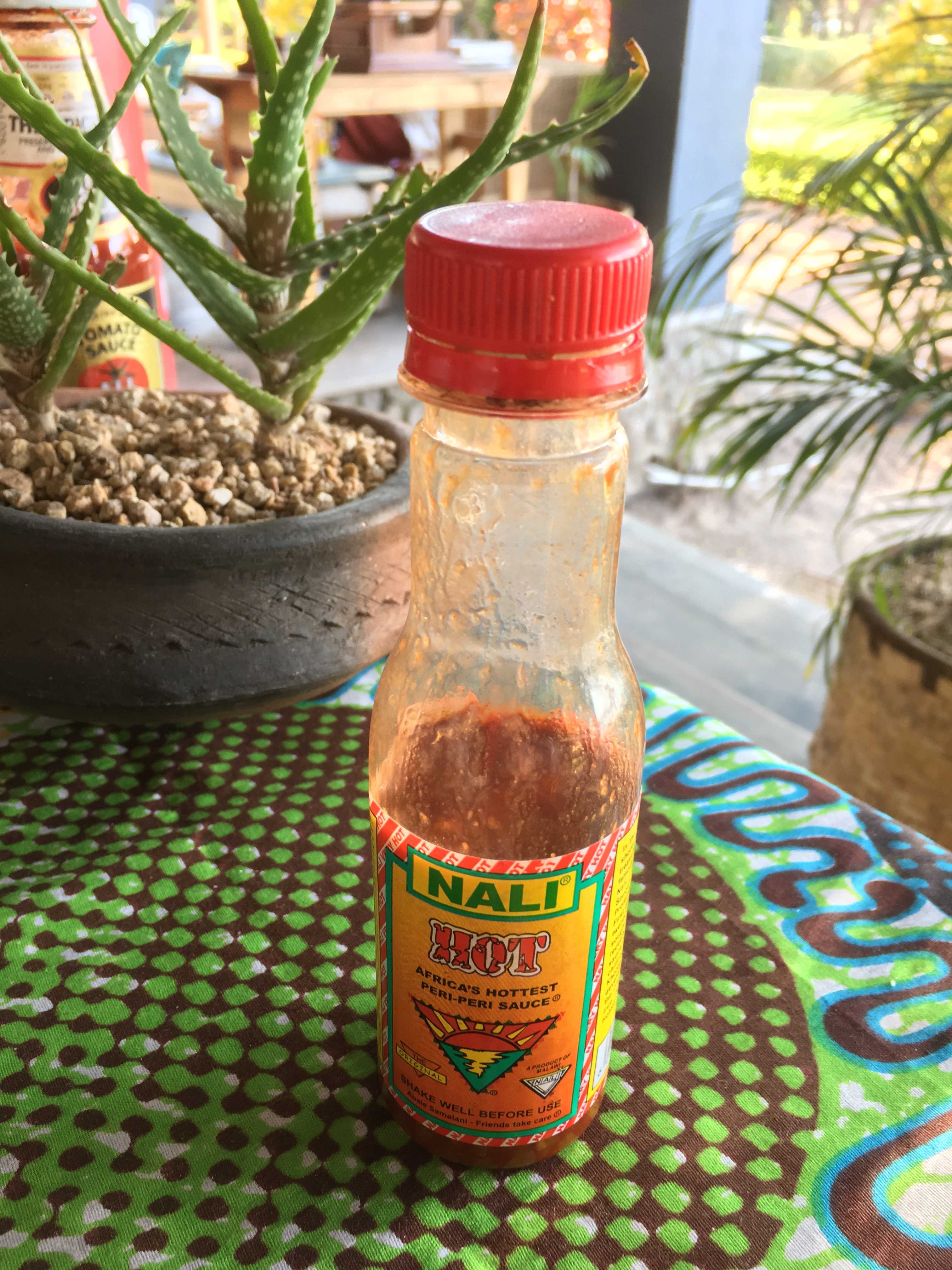 ナリホットソース、マラウイ湖国立公園のモンキーベイにて(Nali hot sauce, Lake Malawi Monkey Bay)